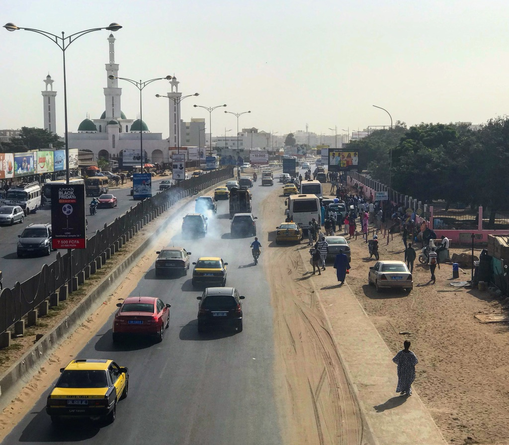 Blick von einer Fußgängerbrücke nach Osten über die Avenue Seydina Limamoulaye, früher bekannt als route de l’aéroport, da sie zum früheren Flughafen Dakar-Léopold Sédar Senghor führte. Dem Straßenverlauf folgt die Grenze zwischen den Stadtbezirken Patte d’Oie (links) und Grand Yoff (rechts). Im Hintergrund die Türme der Mosquée Serigne Modou Bousso Dieng. This is an image with the theme "Africa on the Move or Transport" from: Senegal